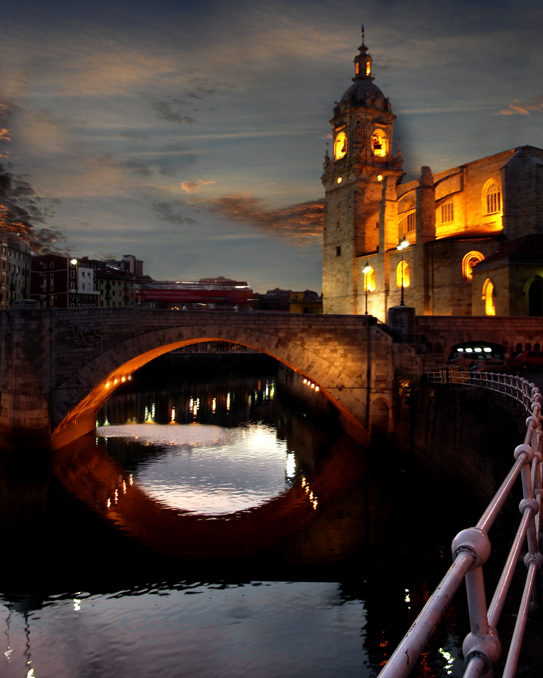 Bilbao, Basque Country. Muelle de San Antón en el Casco Viejo